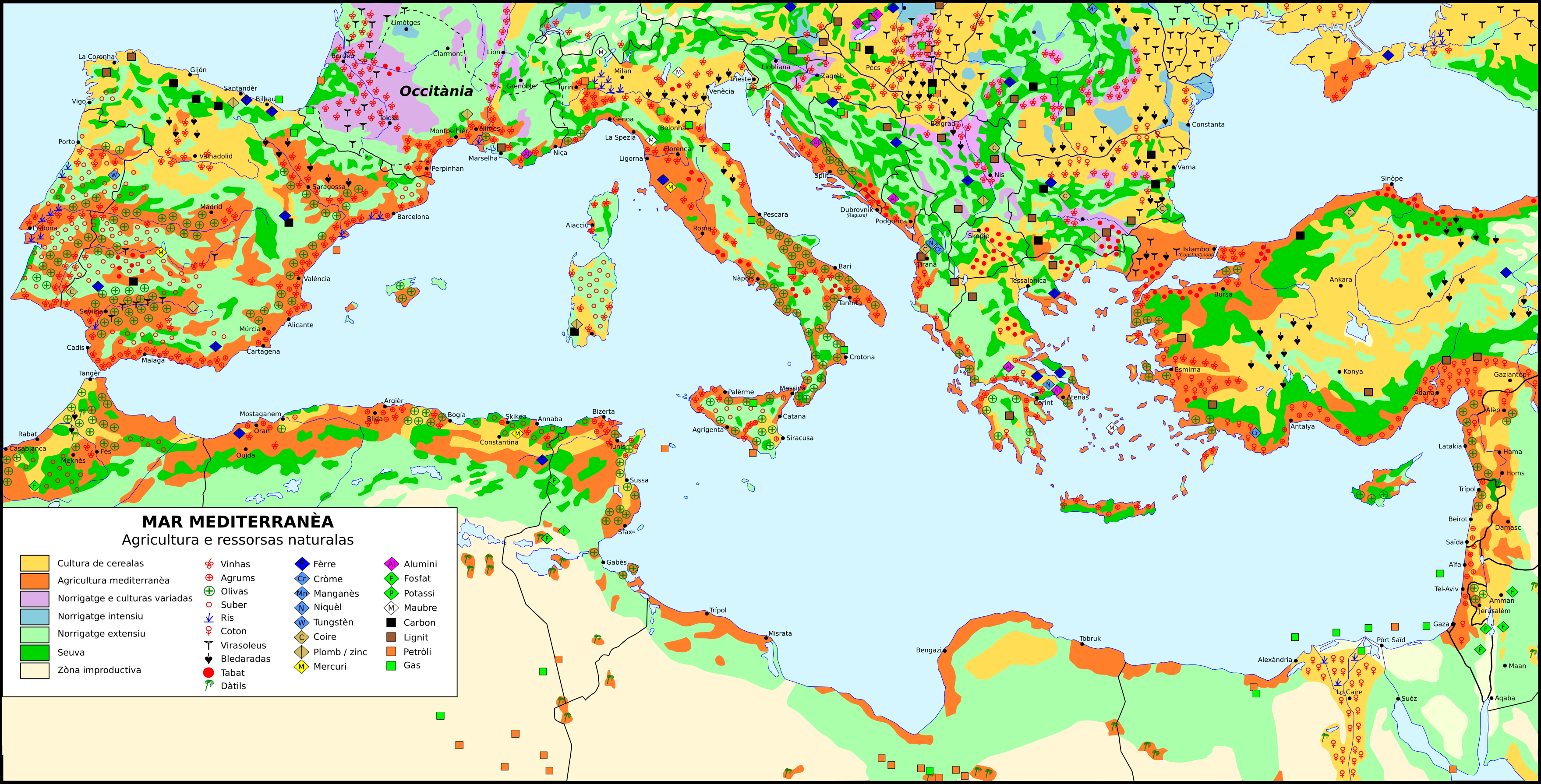 Agricultura e ressorsas naturalas dau Bacin Mediterranèu